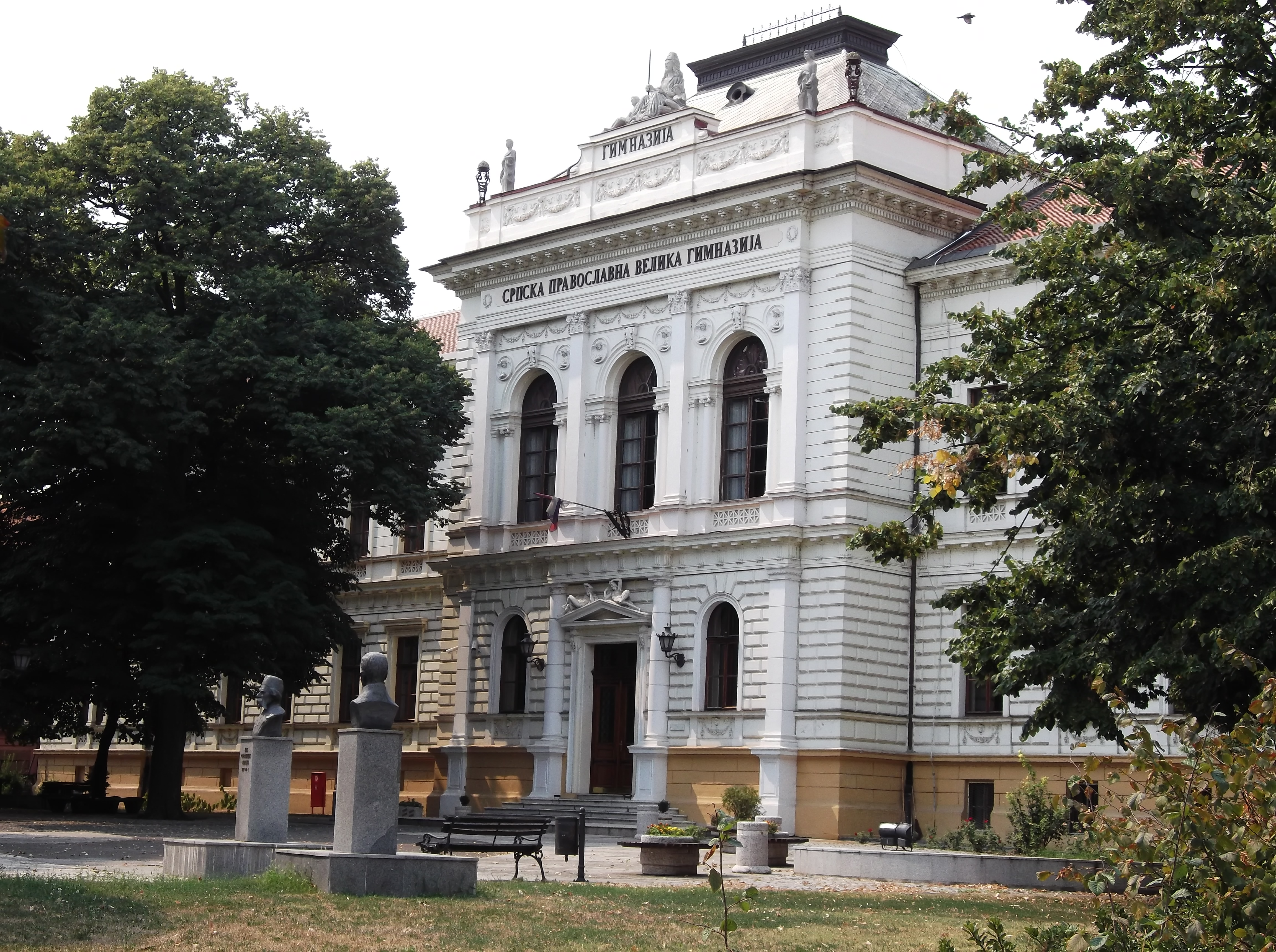 Jovina gimnazija